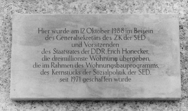 ADN-ZB-Grimm 12.10.88-pra Berlin: Wohnungsübergabe. Die dreimillionste Wohnung, die seit dem VIII. Parteitag der SED 1971 fertiggestellt wurde, befindet sich in der Erich-Correns-Straße 22 im Stadtbezirk Hohenschönhausen. Eine Erinnerungstafel wurde über dem Hauseingang angebracht.